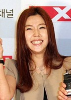 AXN코리아 한국 서비스 론칭 이벤트